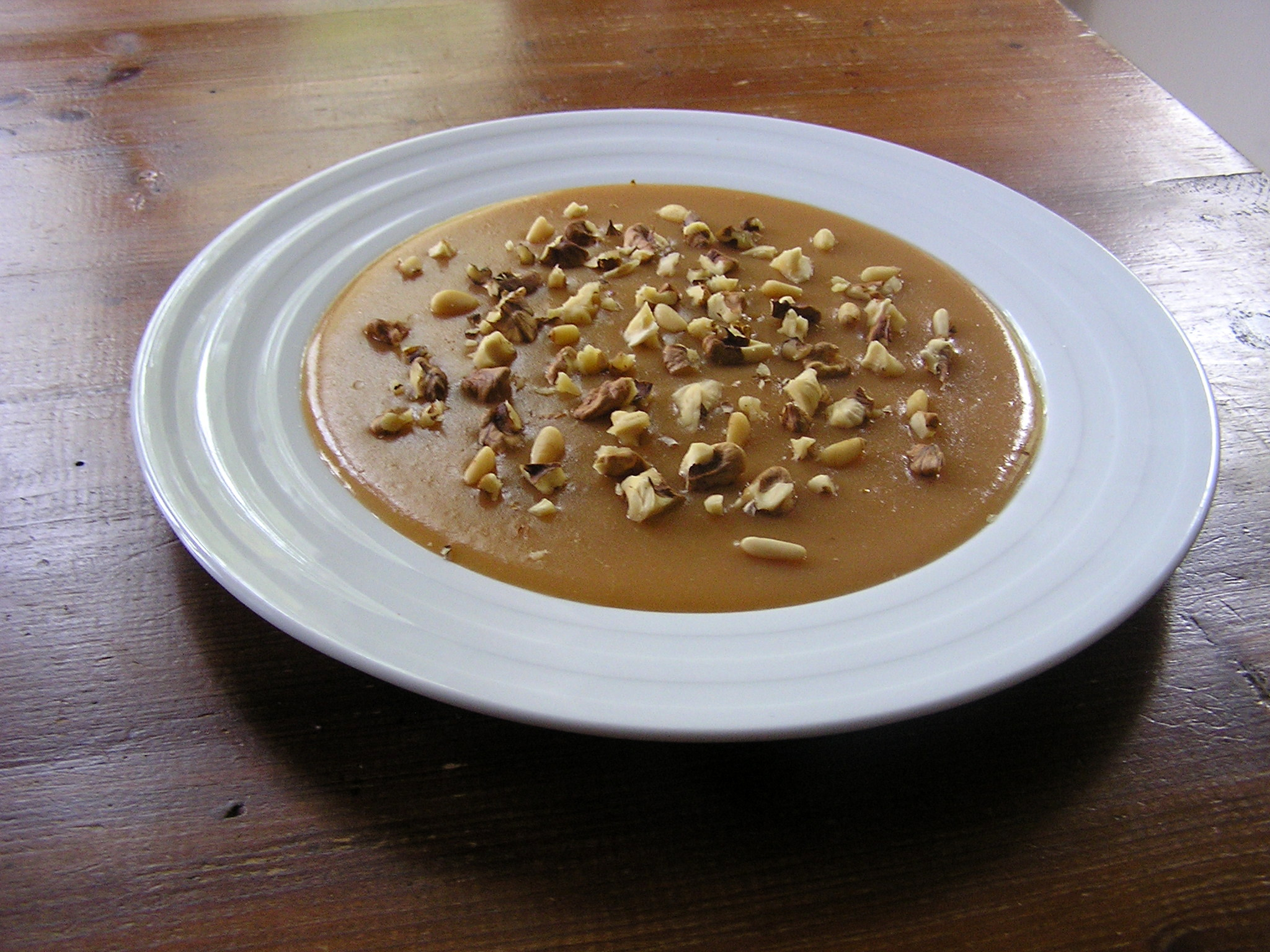 sciugheti, tipico dolce marchigiano a base di mosto d'uva bianca o nera